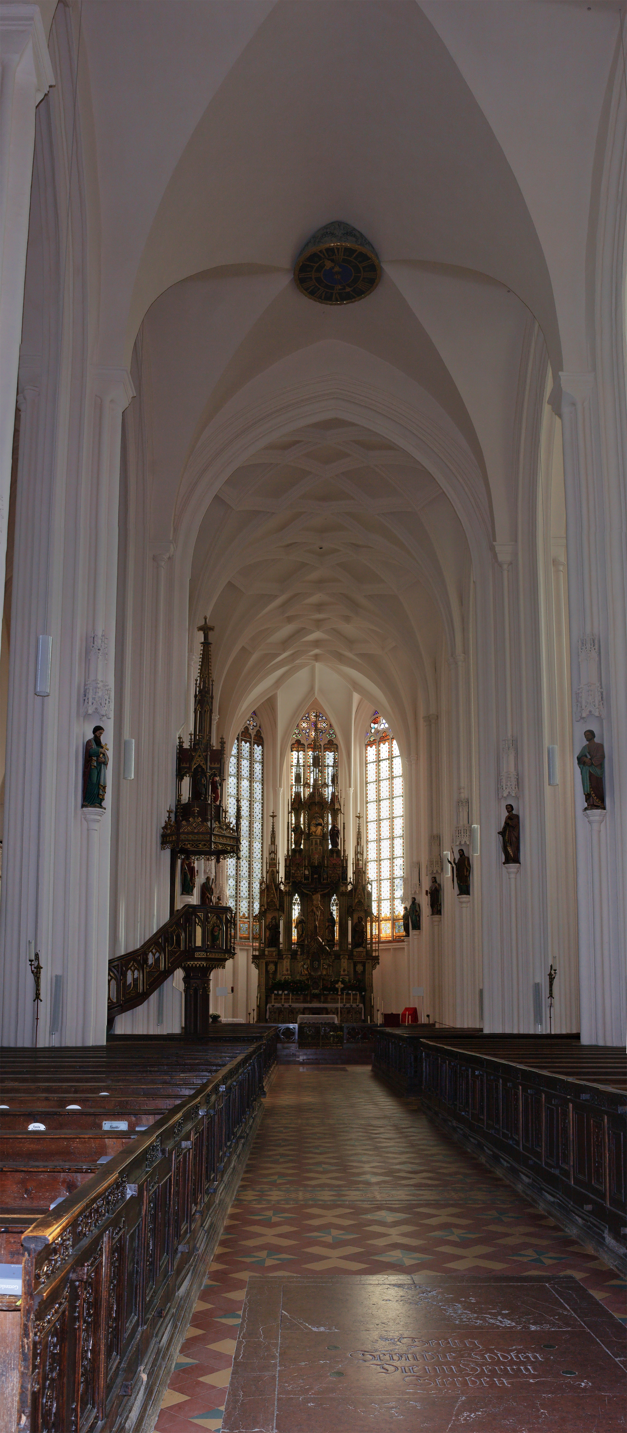 Das Mittelschiff der Steyrer Stadtpfarrkirche mit Blick zum neugotischen Hochaltar